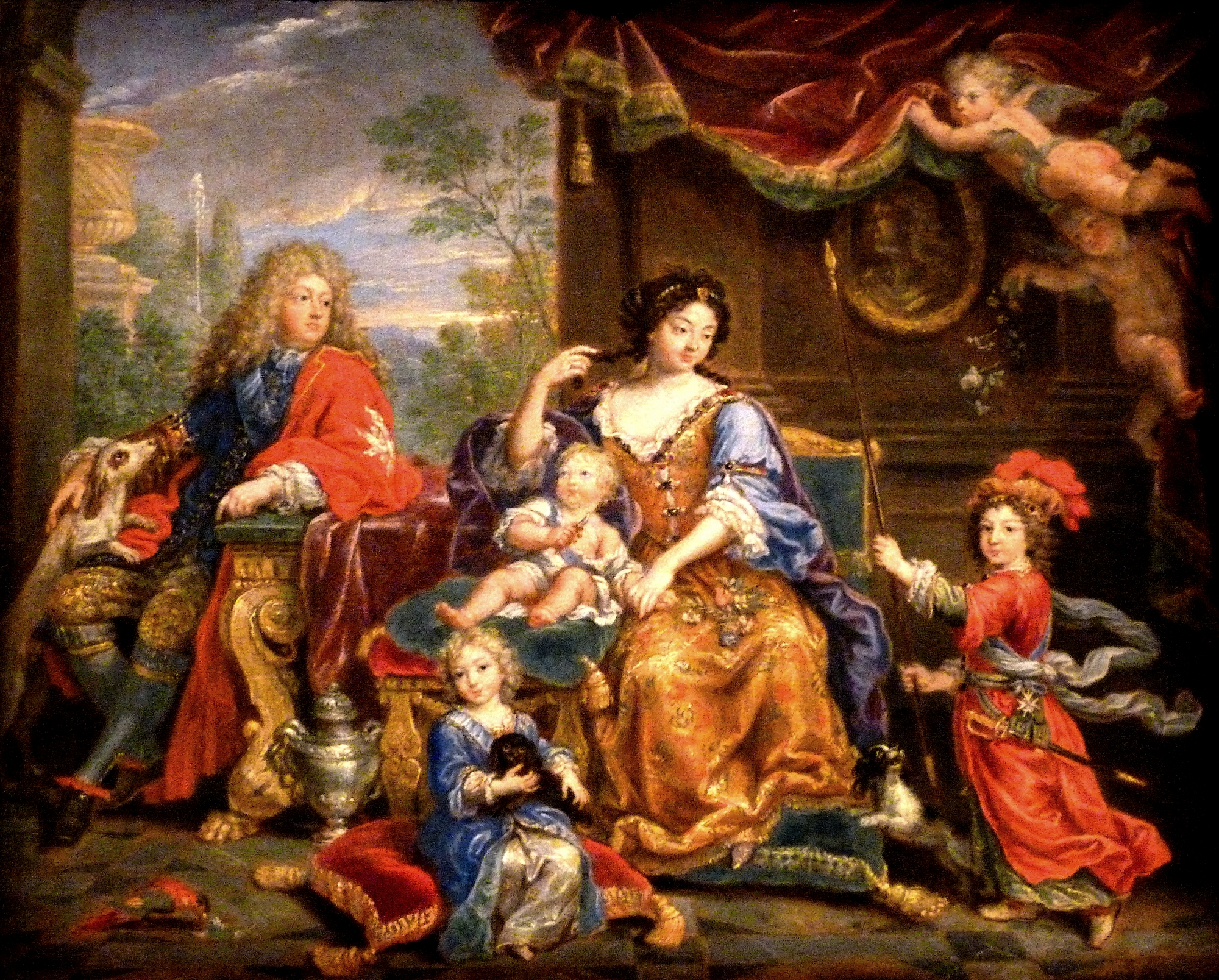 La Famille du Grand Dauphin (vers 1688), huile sur toile par Pierre Mignard, modello pour le grand tableau commandé par Louis XIV. Collection particulière de Georges de Lastic (1927-1988) lors de l'exposition Le cabinet d'un amateur, n°28, au musée de la chasse et de la nature, Paris (décembre 2009-mars 2010). Le tableau définitif, peint en 1687, 232 x 304 cm, est conservé au Château de Versailles, MV 8135.